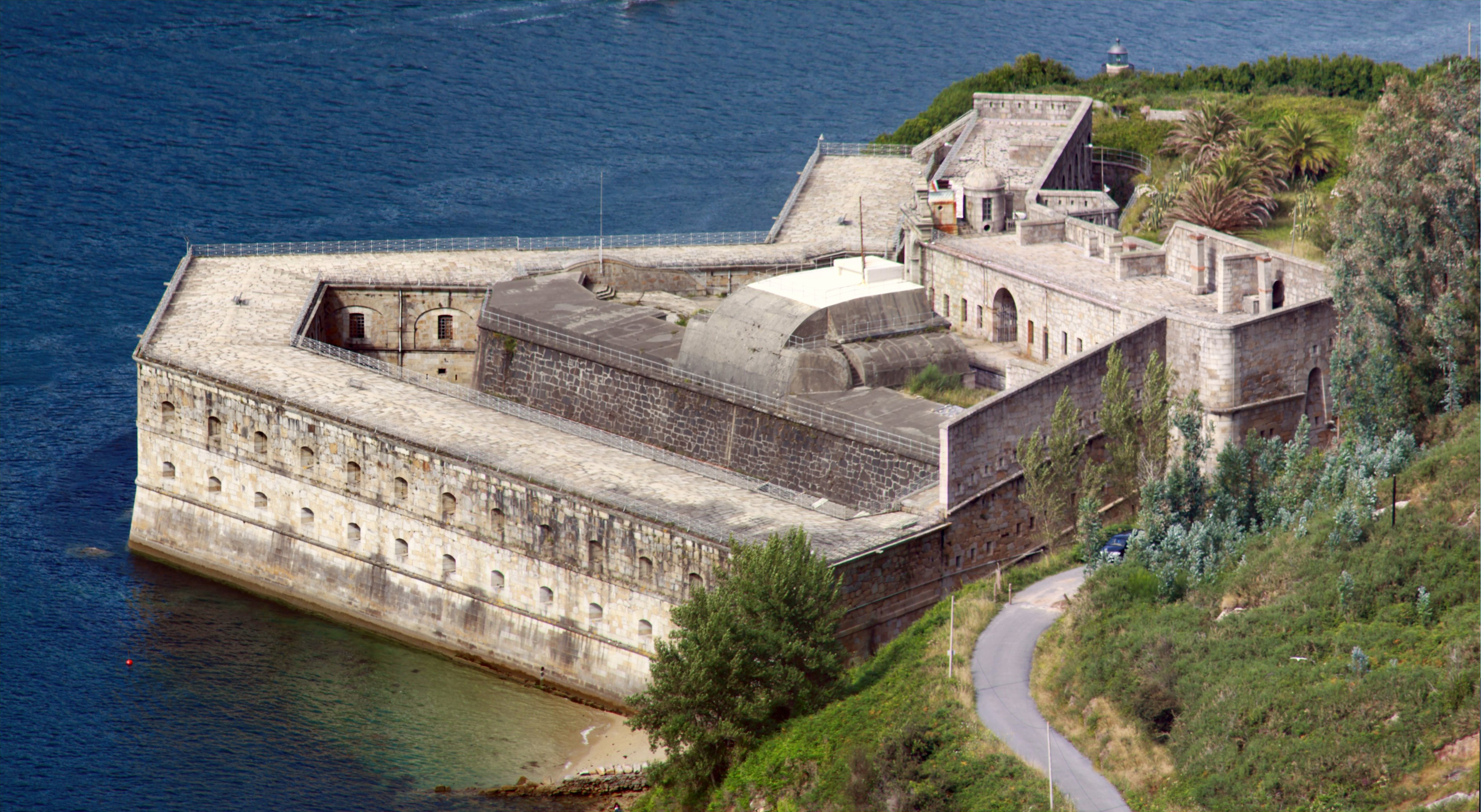 Castelo da Palma, Mugardos, Galiza